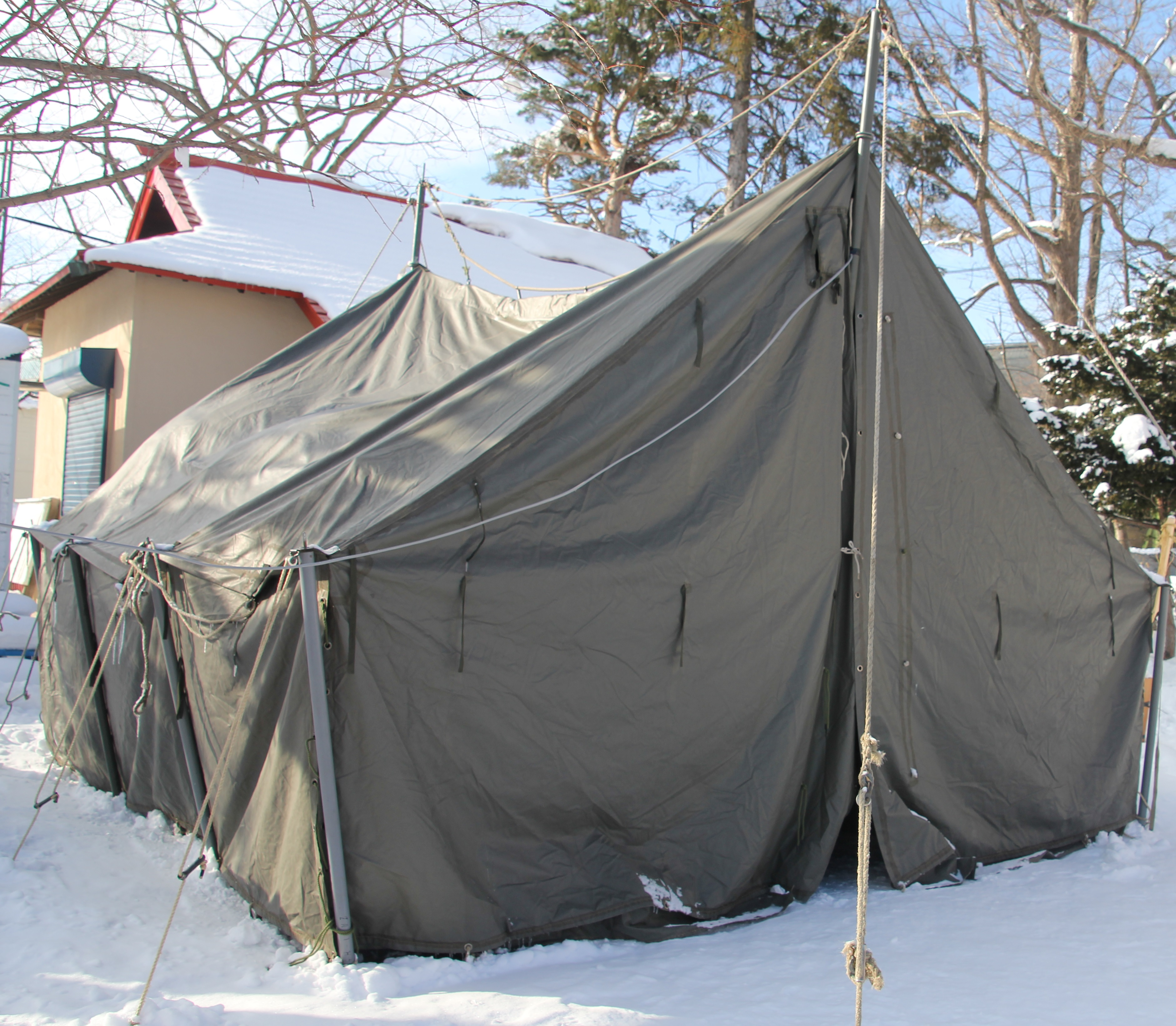 屋根型天幕1号 主として中隊の指揮活動用や軽微な整備等で使用します。 通常演習や民生支援等で使用している屋根型天幕と違って、側面に天幕がある為に冬期でも小型ストーブ一つで結構暖かいです。 この写真は第26普通科連隊第2中隊に所属時代に、警備担任区域のイベントで使用した際に自分が長として派遣されていた事もあり、何かの記念にと撮影した写真より。